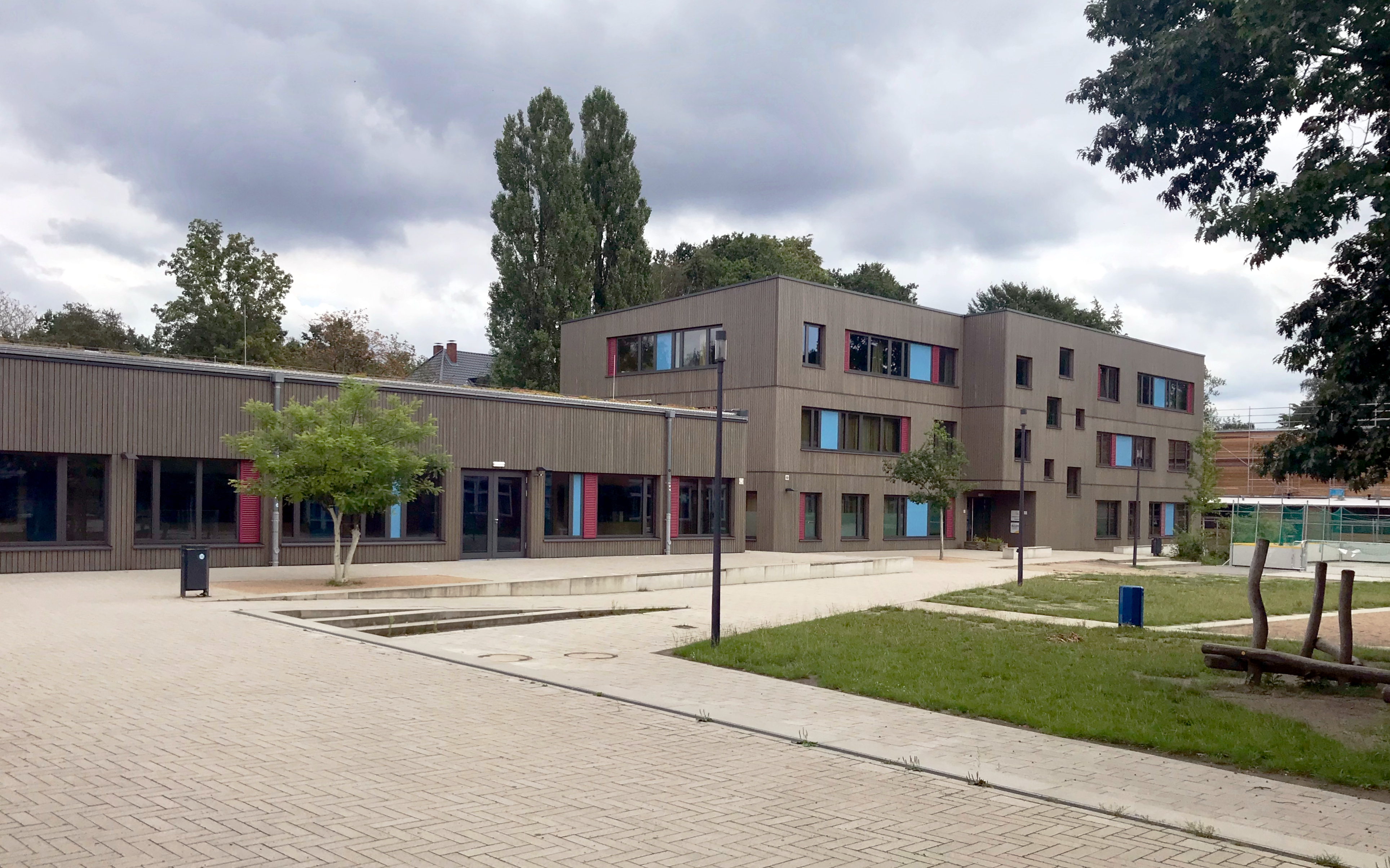 Stadtteilschule Flottbek in Hamburg, eingeschossiger und dreigeschossiger Neubau (Baujahr 2013), Westfassade zum Schulhof hin.